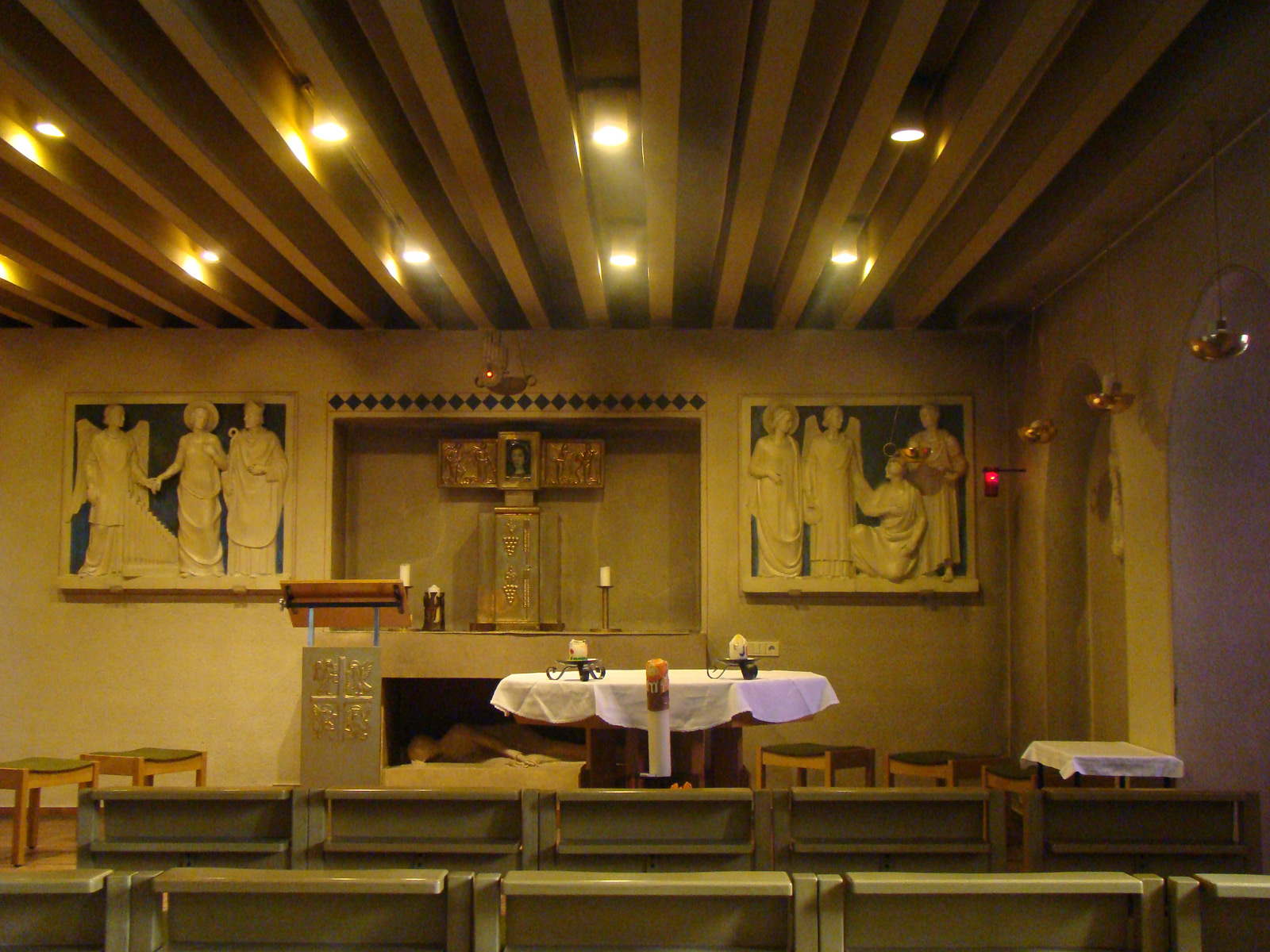 St. Cäcilia in Mosbach, Krypta